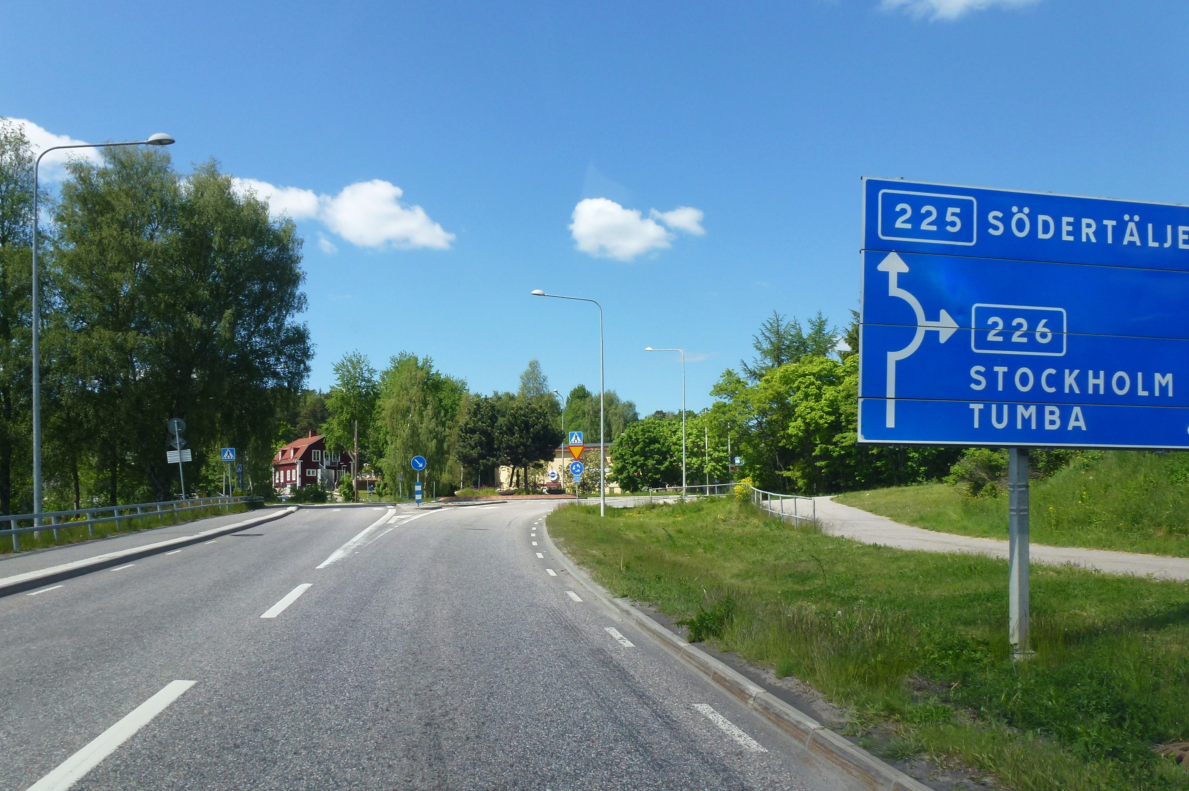 Infart till Vårsta från öst (Länsväg 225)